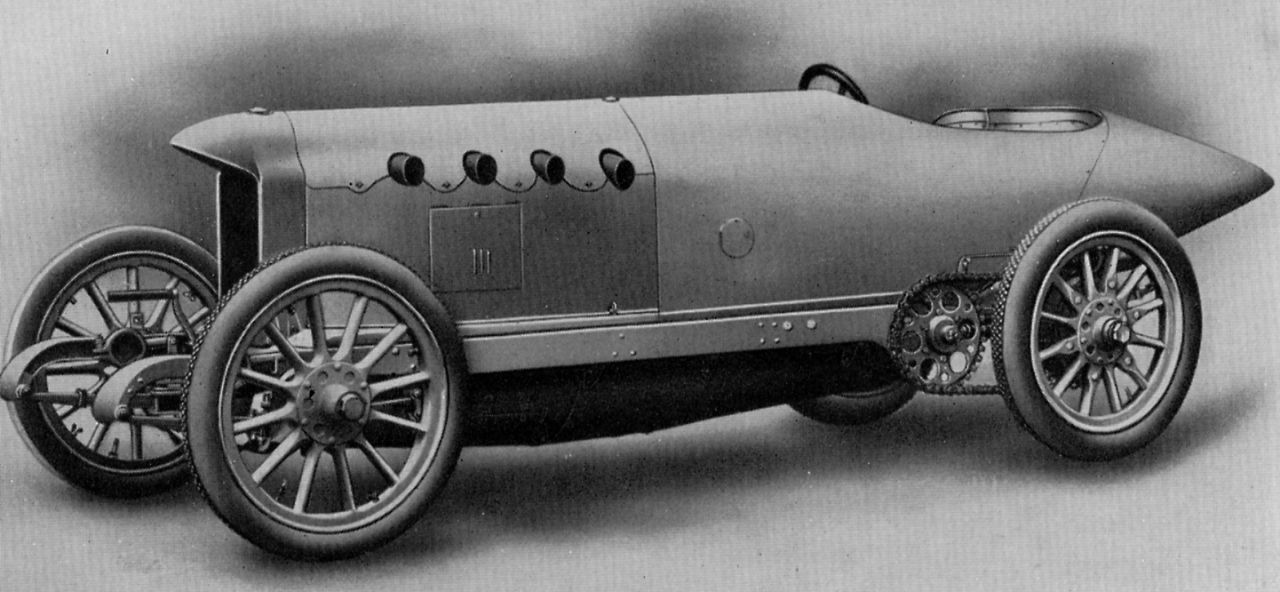 Abb. 34. Der Blitzenbenz erreichte 1911 die Weltrekordgeschwindigkeit von 228 km